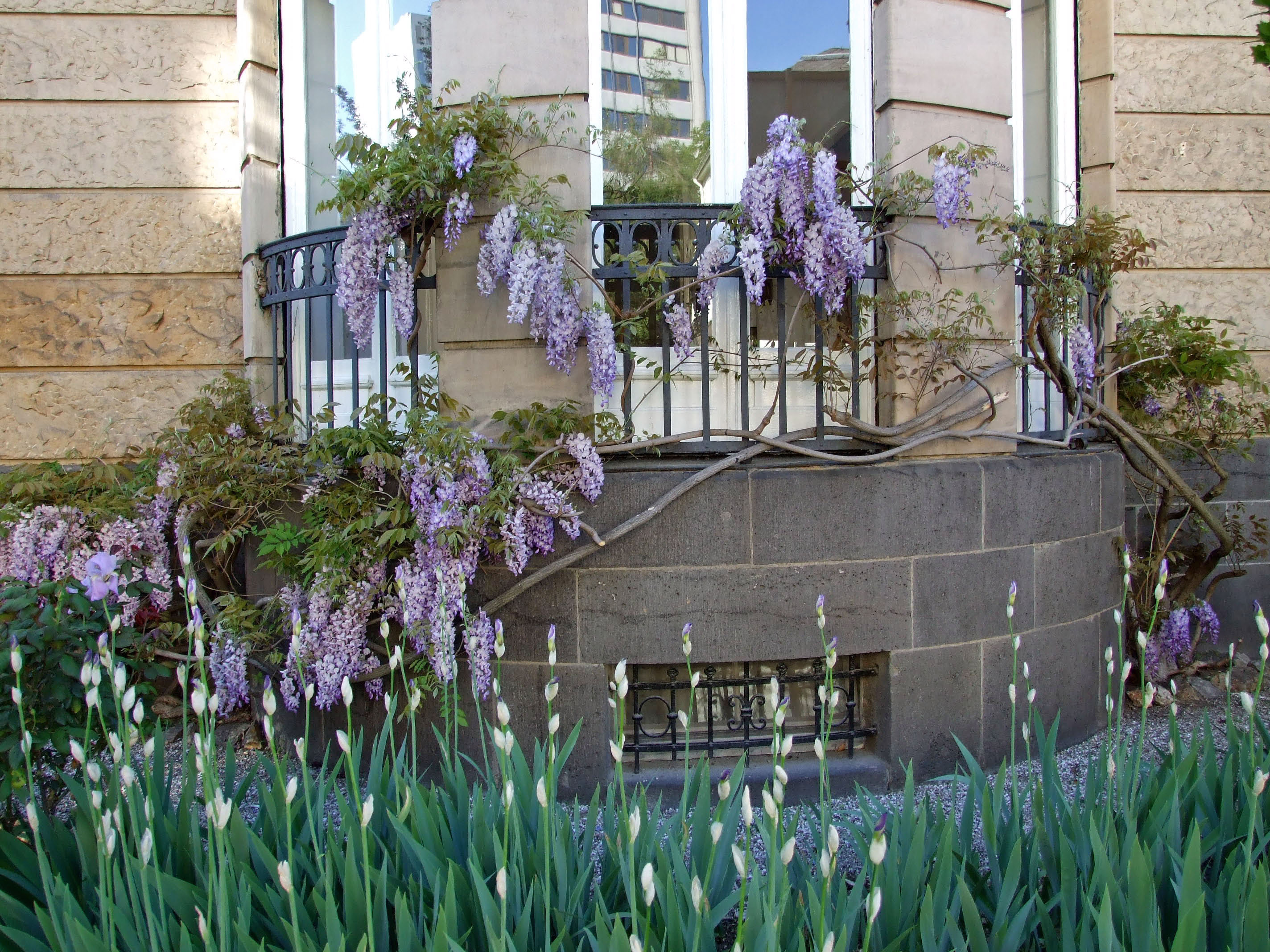 Vorgarten im Frühjahr